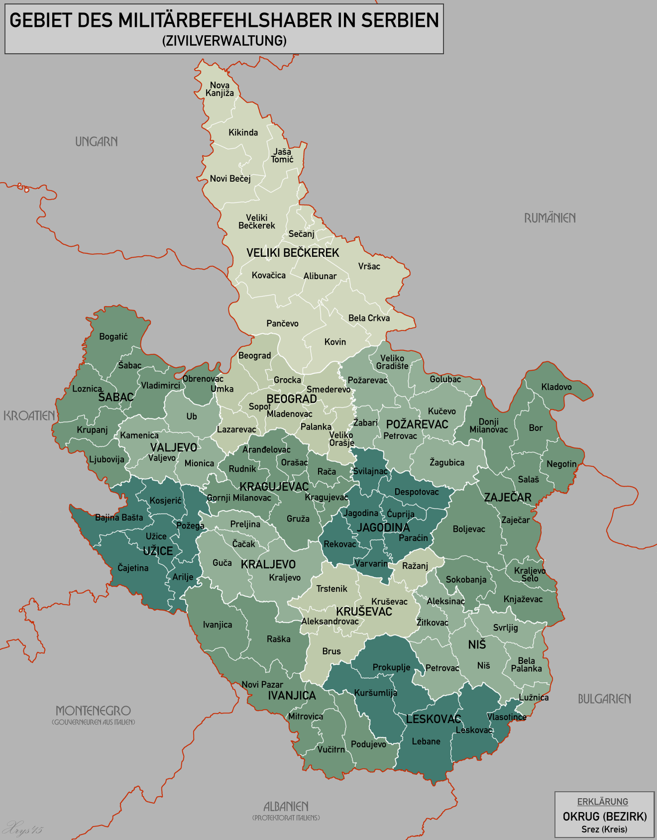 Karte des Gebiet des Militarbefehlshaber in Serbien 1941-45. Zivilverwaltungs Berizke und Kreise. Quelle; Wilfried Krallert, 200k Volkstumskarte Jugoslawien, Wien (1941). MOD M.D.R. Misc/8380 German Occupied Serbia (1944).